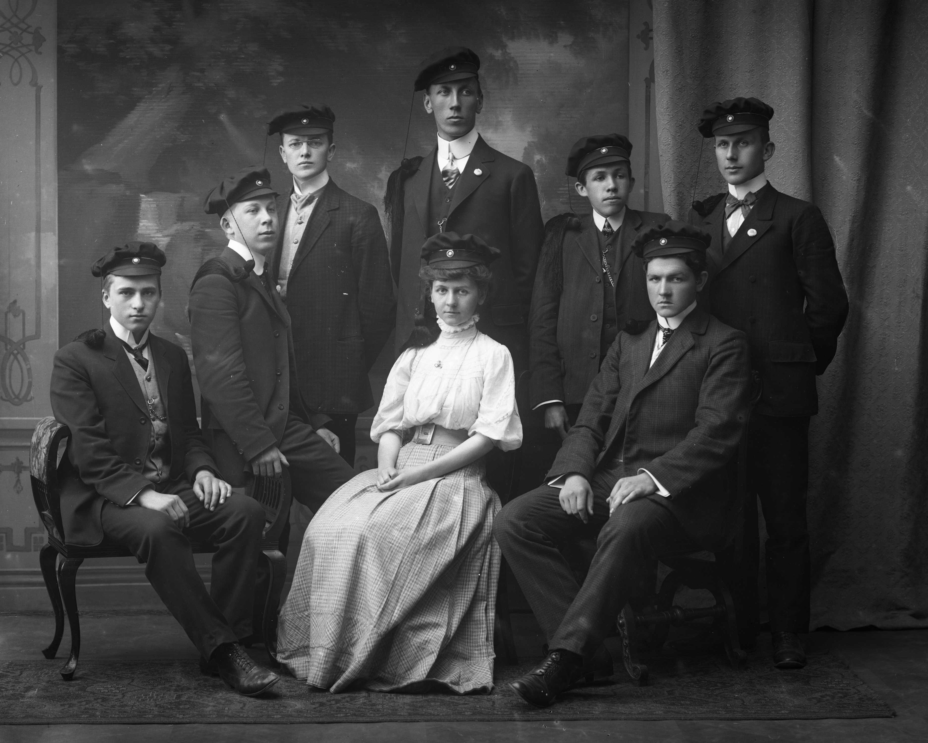 Fotografiet befinner seg i Oslo Museums samling. Det er lagt ut på og motivet oppgis å være "Ragna Nielsen`s skole , latiner gruppe 06.07.1909".